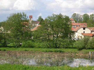 Village de Faverois (Territoire de Belfort) Photo prise en mai 2004 par LP90 Licence GFDL LP90 mai 2004